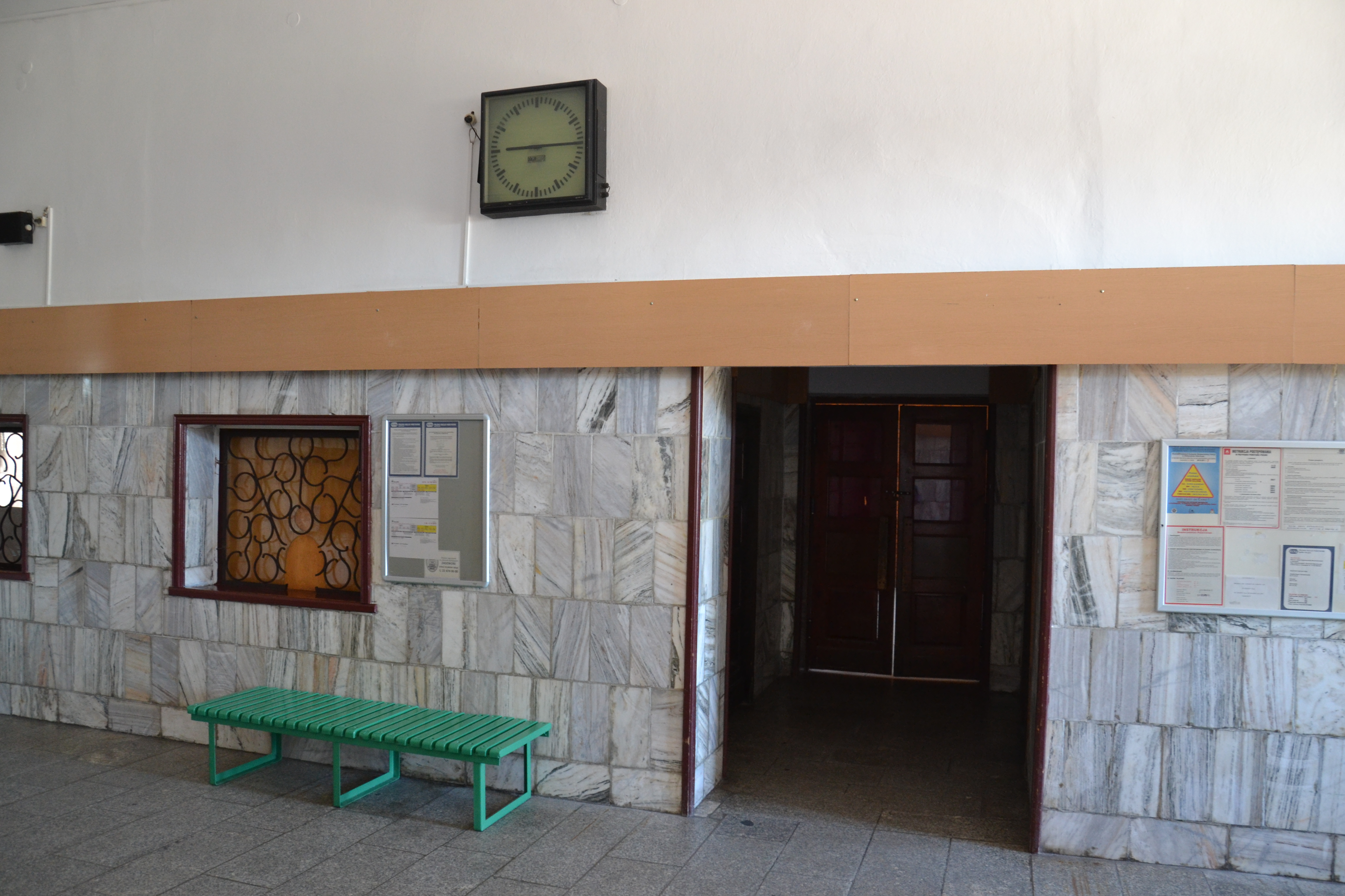 Wnętrze poczekalni w Suwałkach This photo was taken during Railway Wikiexpedition 2015 set up by Wikimedia Polska Association in cooperation with Fundacja Grupy PKP. You can see all photographs in category Wikiekspedycja kolejowa 2015.